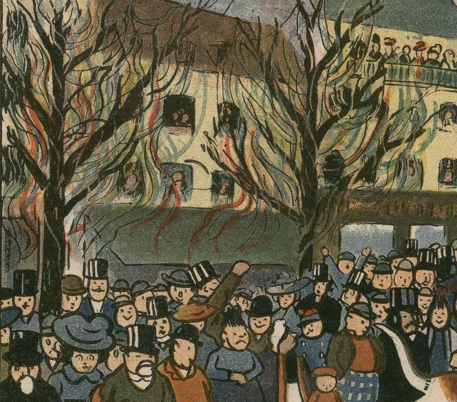 Les serpentins du Carnaval de Paris sur les arbres des Grands Boulevards vus par André Hellé. Détail d'une image figurant le cortège du Bœuf Gras : File:André Hellé - Le boeuf gras - avant 1914.jpg